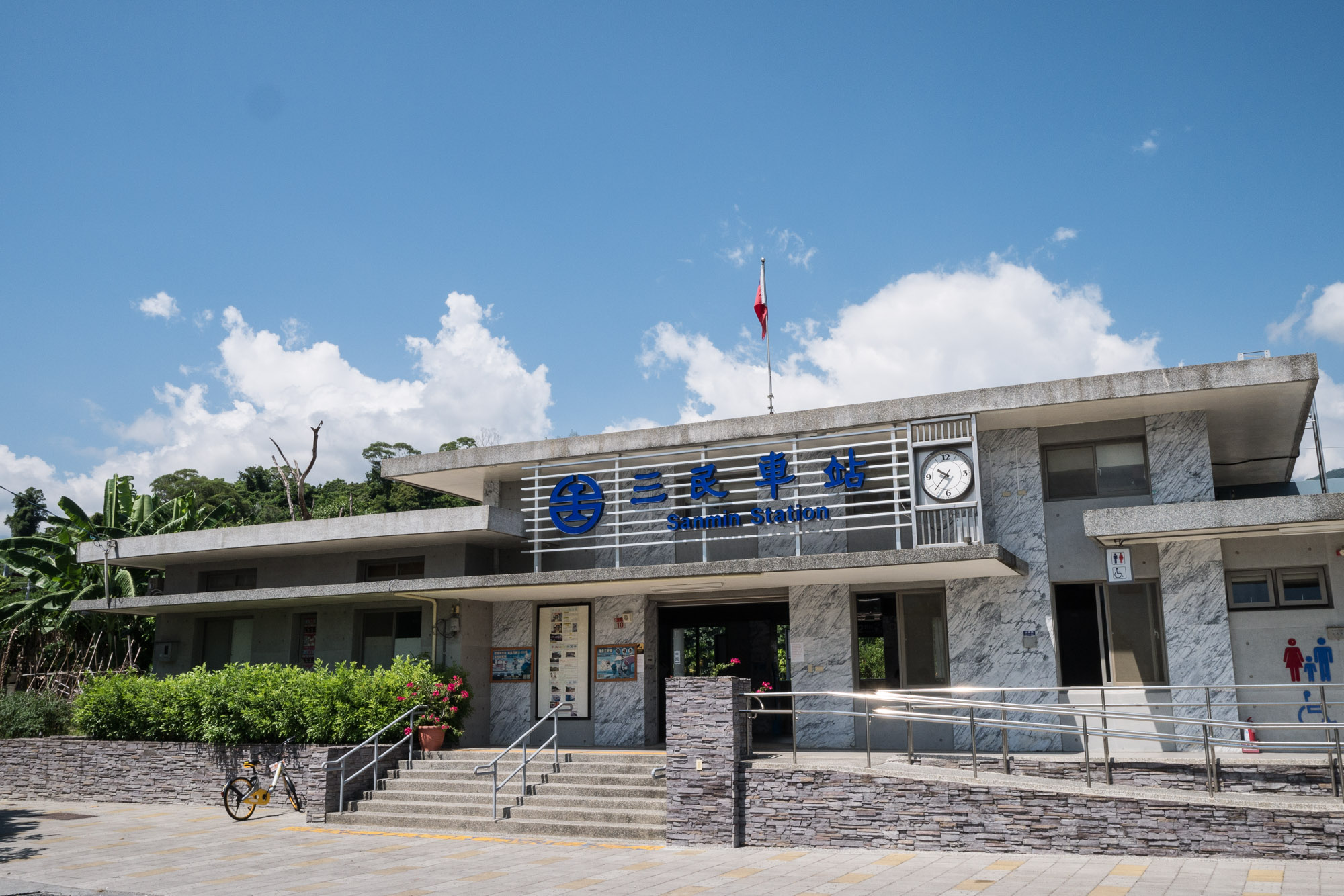 台灣鐵路管理局三民車站